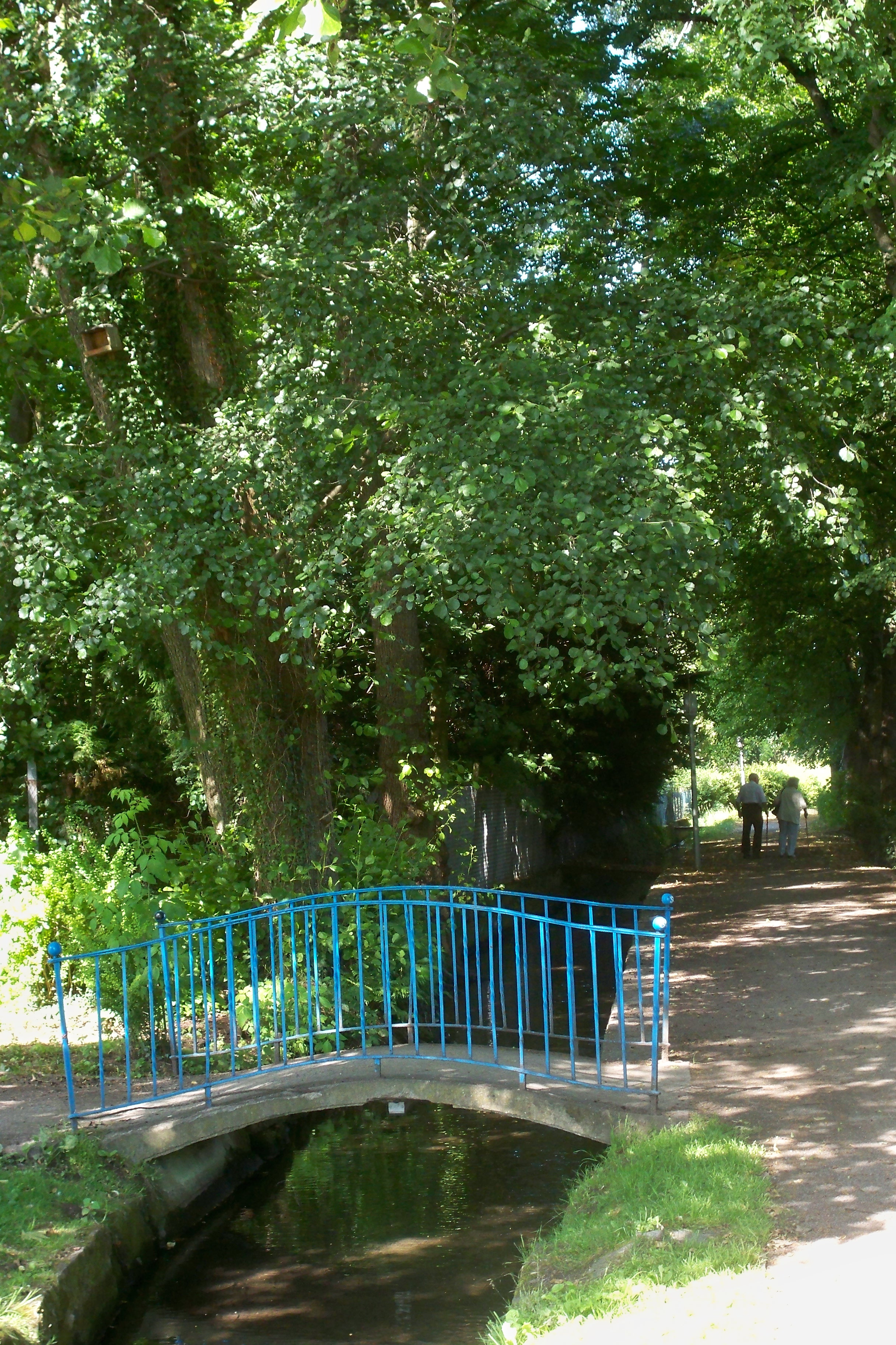 Gezeigt wird ein Teil vom Mühlendammweg am sogenannten Ententeich am Kloster Wennigsen, der sehr gerne von Spaziergängern genutzt wird.